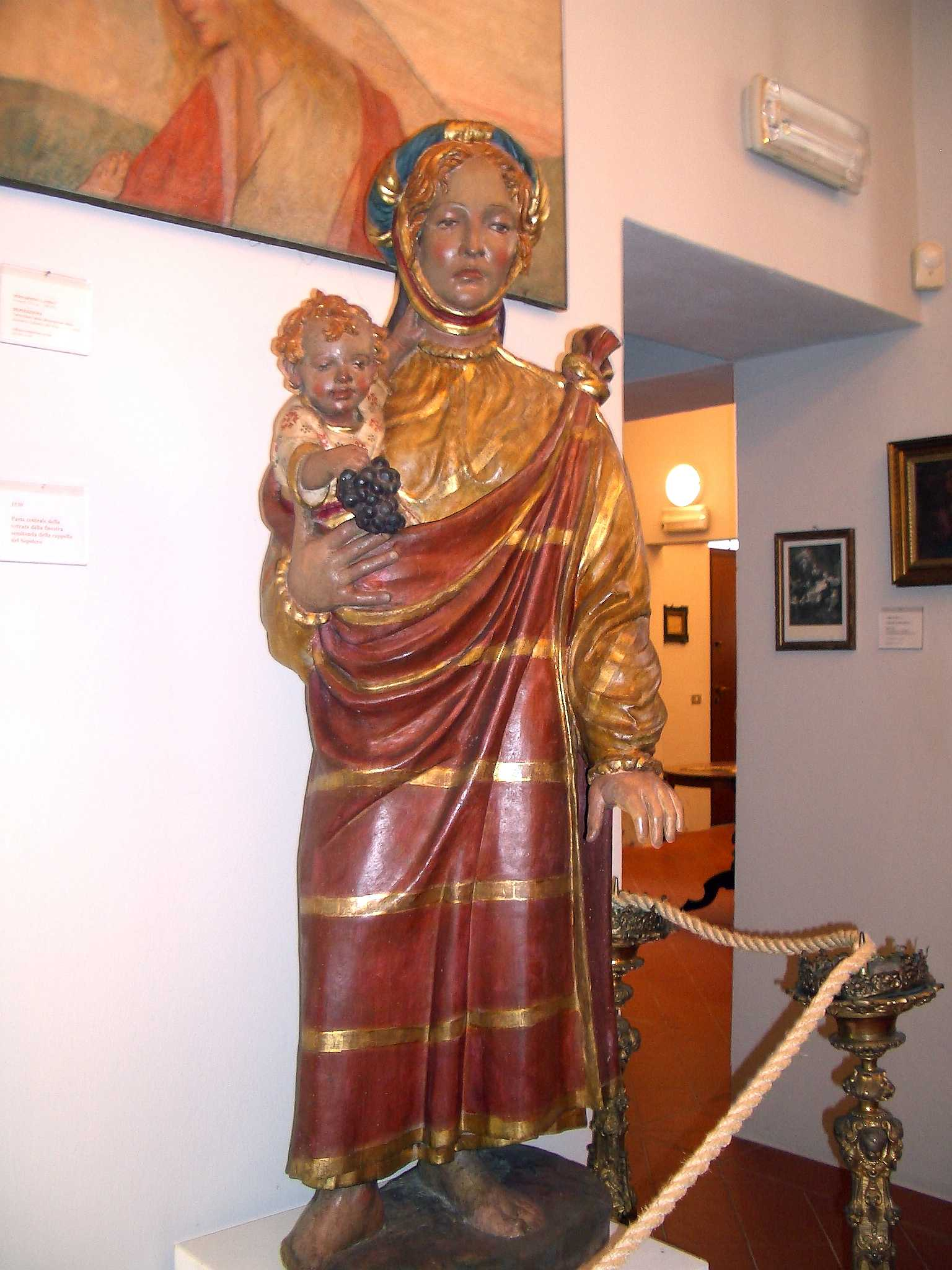 Andrea da Saronno, Gipsy, statue formerly belonging to the Lamentation of Christ group (detail), Santuario della Beata Vergine dei Miracoli, Saronno (Varese), Italy